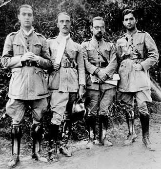 Médico do 1º Batalhão da Força Pública para a Zona do Túnel da Mantiqueira, no sul de Minas, durante a Revolução Constitucionalista. Torna-se amigo de Benedito Valadares, delegado federal na região.